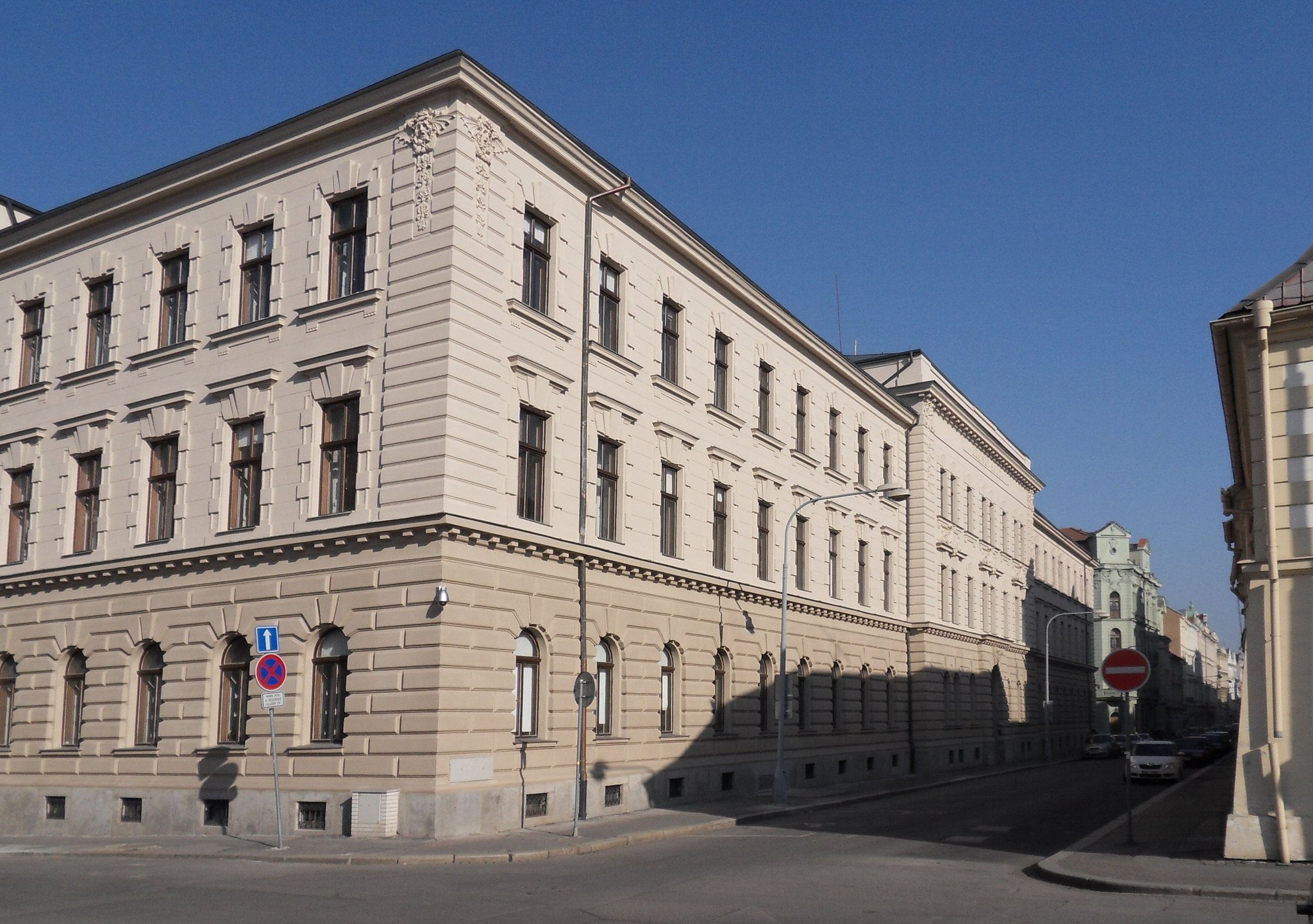 Budova krajského soudu v Plzni ve Veleslavínově ulici